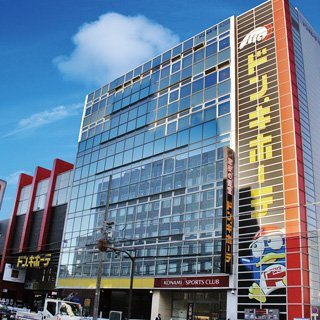 PPIH 中目黒本社